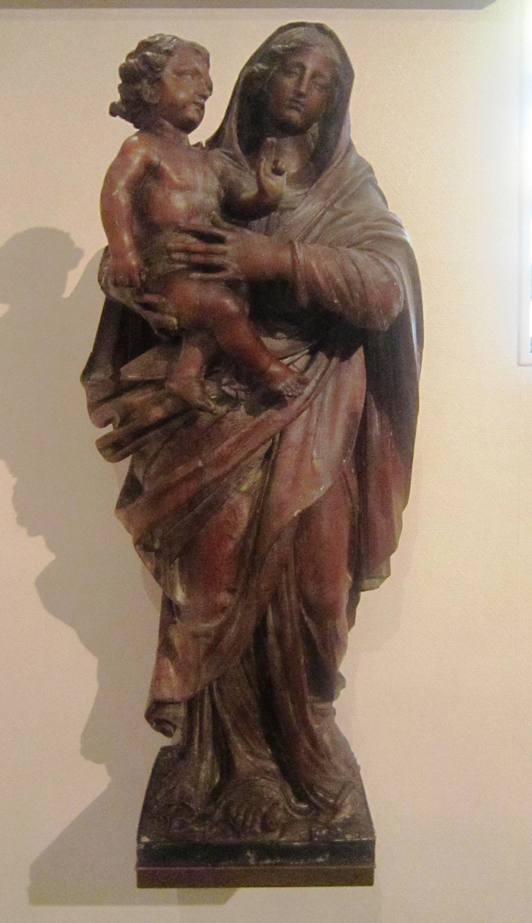 Notre-Dame d'Humilité (XVII°) Basilique Saint-Denys d'Argenteuil